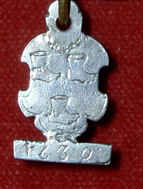 ältestes Schildchen (Rückseite) der Königskette der Liebfrauen-Schützenbruderschaft von 1630 Münster, König Henric Trippelfoett, Gerichtsschreiber